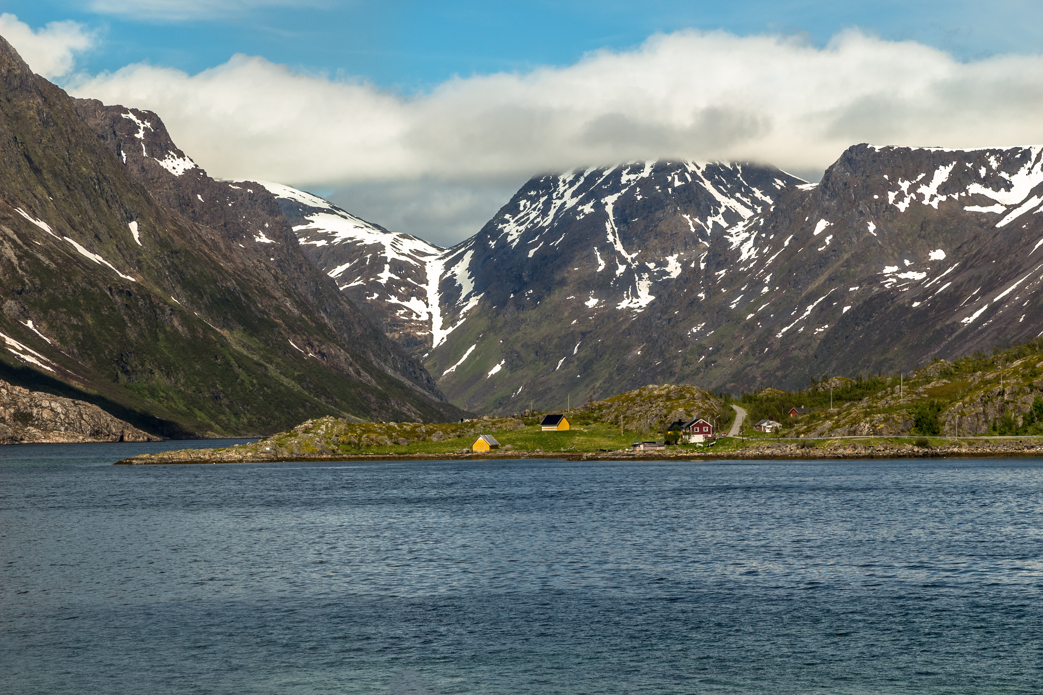 Kufjord